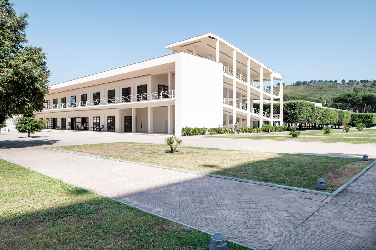 Prospettiva del Ristorante con Piscina di Carlo Cocchia, Mostra d'Oltremare